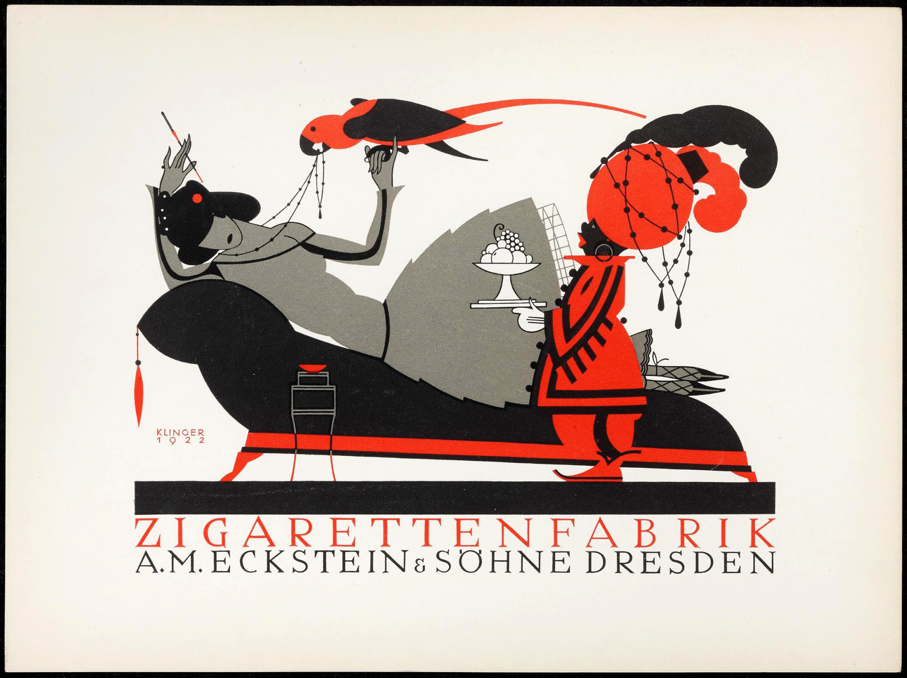 Plakat von 1922 von Julius Klinger für die Zigarettenfabrik A. M. Eckstein & Söhne in Dresden ...